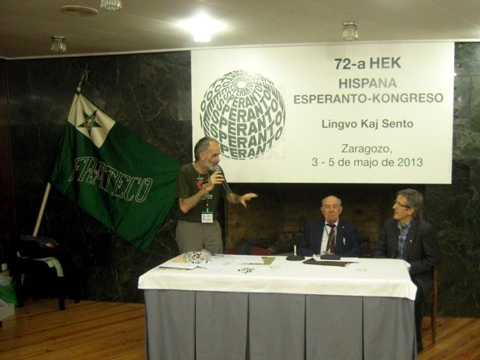 72a Hispana Kongreso de Esperanto